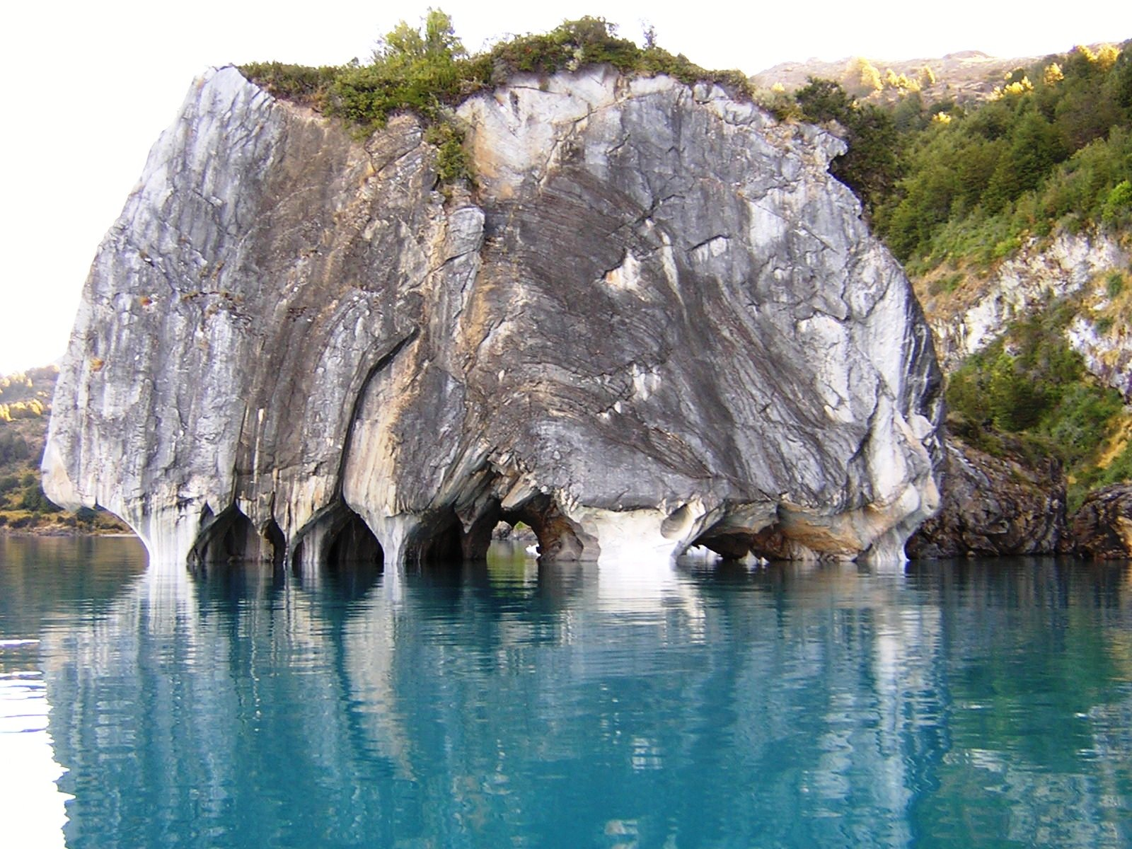 Cuevas excavadas por oleaje lago Carrera, Aysén